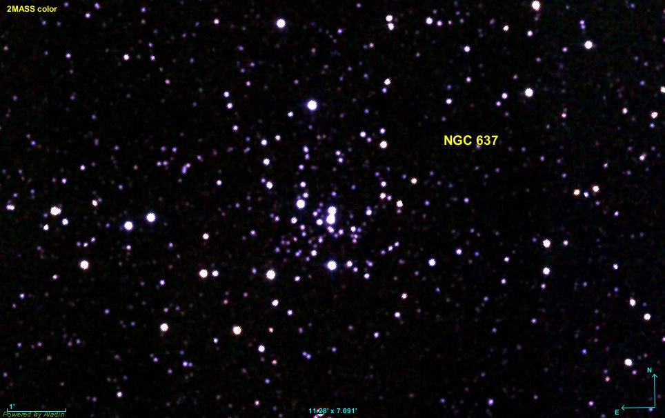 Image créée à l'aide du logiciel Aladin Sky Atlas du Centre de Données astronomiques de Strasbourg et des données publiques en format FIT de 2MASS